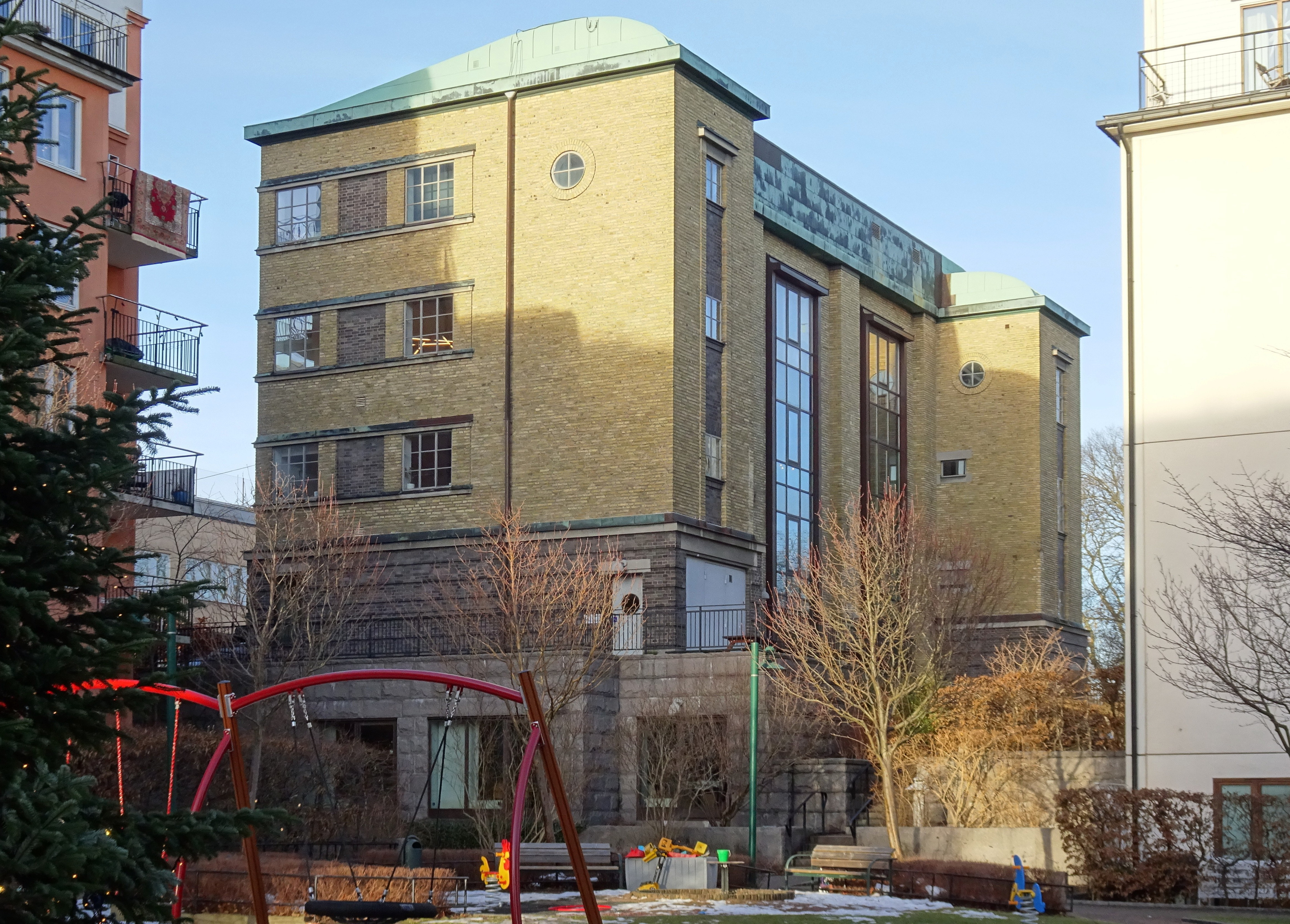 Danviksstationen vid Alsnögatan / Tegelviksgatan (Nektarinen 1)